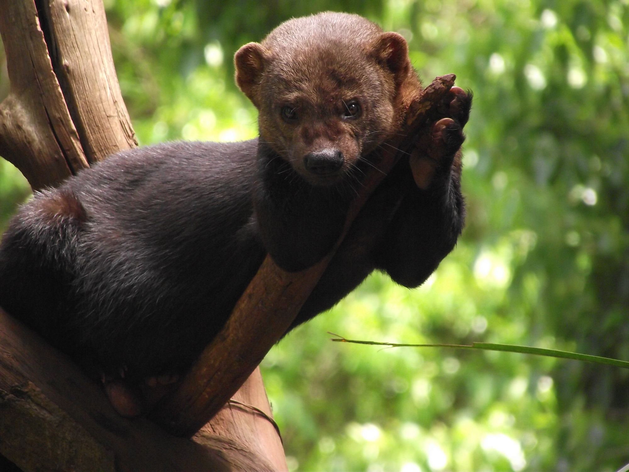 Eira barbara